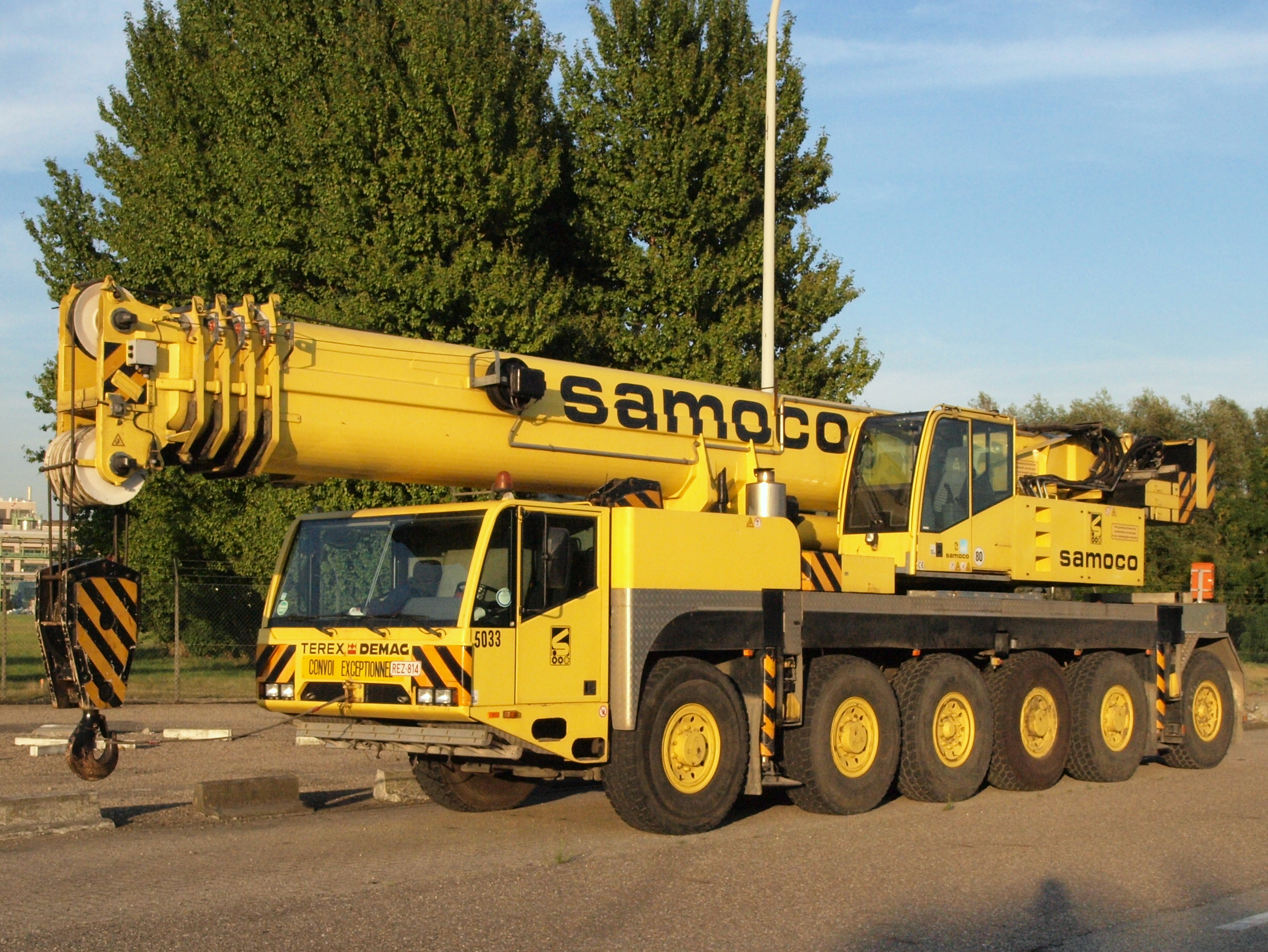 Terex Demag